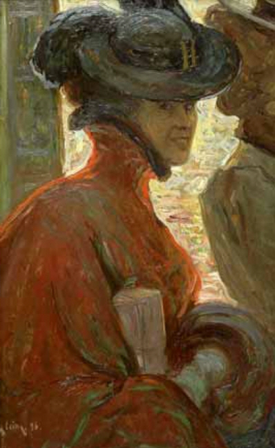 Portrait Jane Avril, Paris 1898, Öl auf Karton, 67,5 x 42 cm Theaterwissenschaftliche Sammlung der Universität zu Köln, Schloss Wahn, Inv.Nr. 06/10